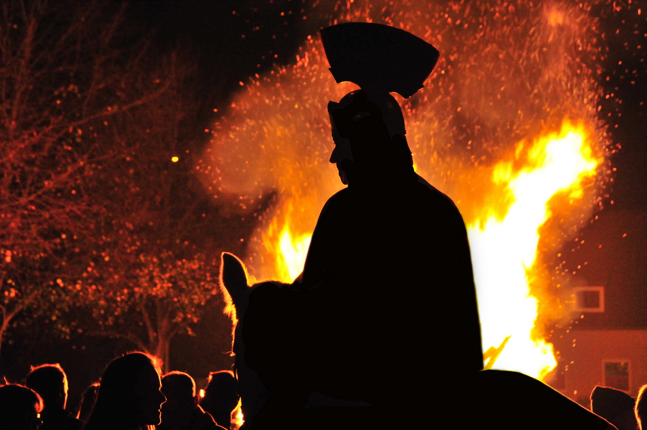 St. Martin in Aachen-Schleckheim